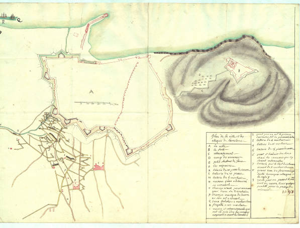 Plan de la ville et des ataques de Barcelone, 1697.